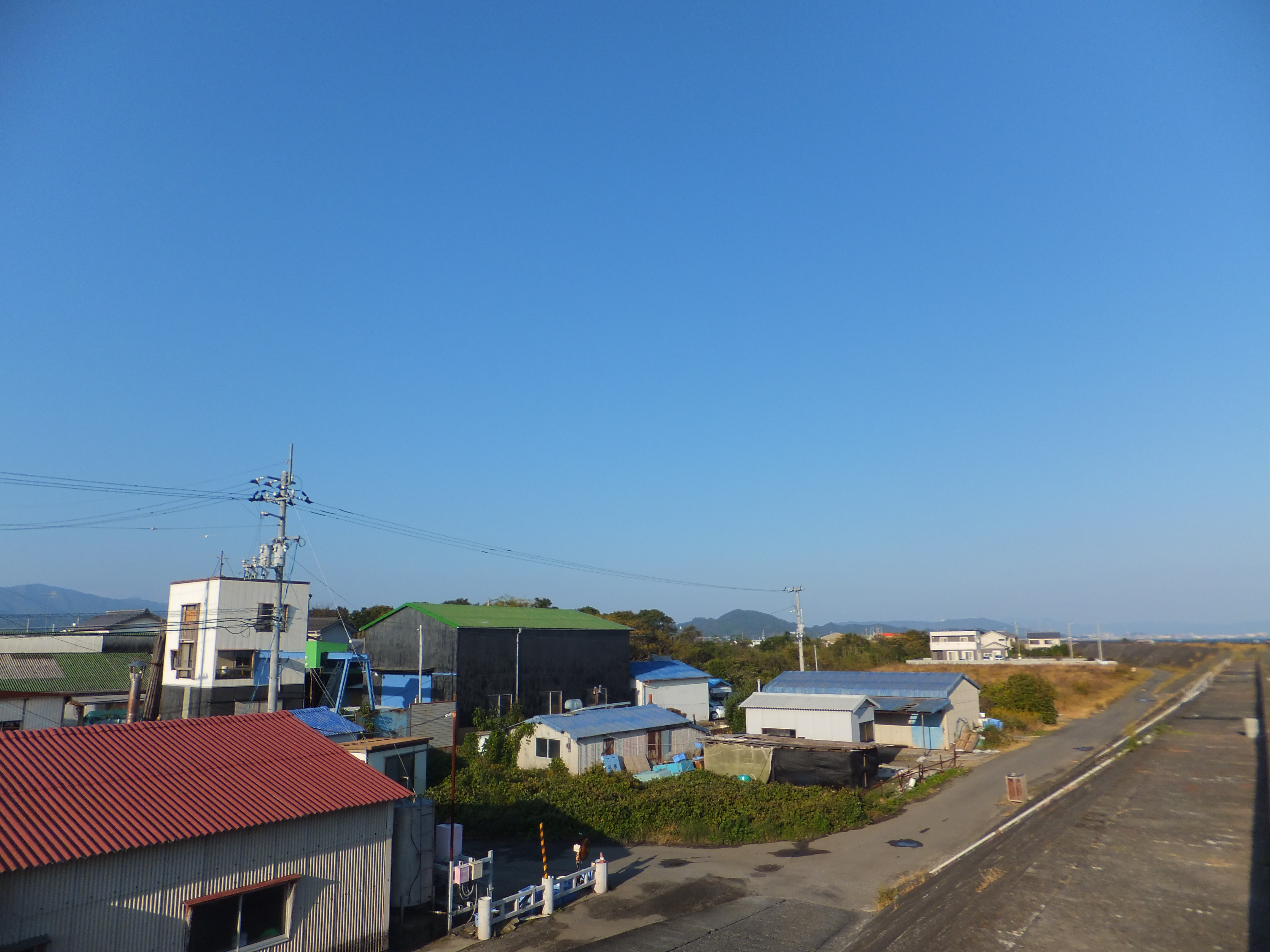 徳島県小松島市和田島町浜田